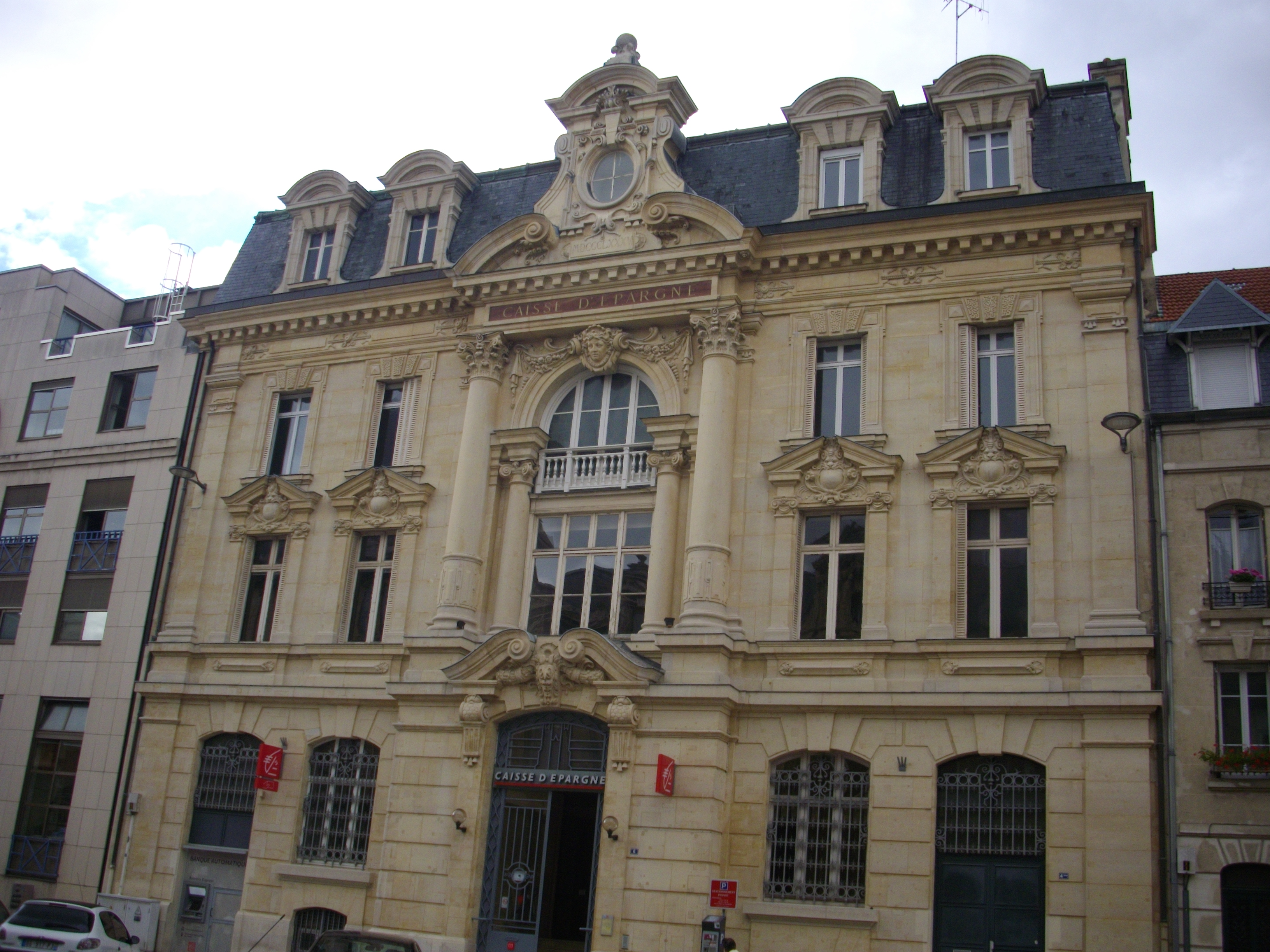 Caisse d'Épargne, rue de la Grosse-Écritoire, à Reims (Marne, France)